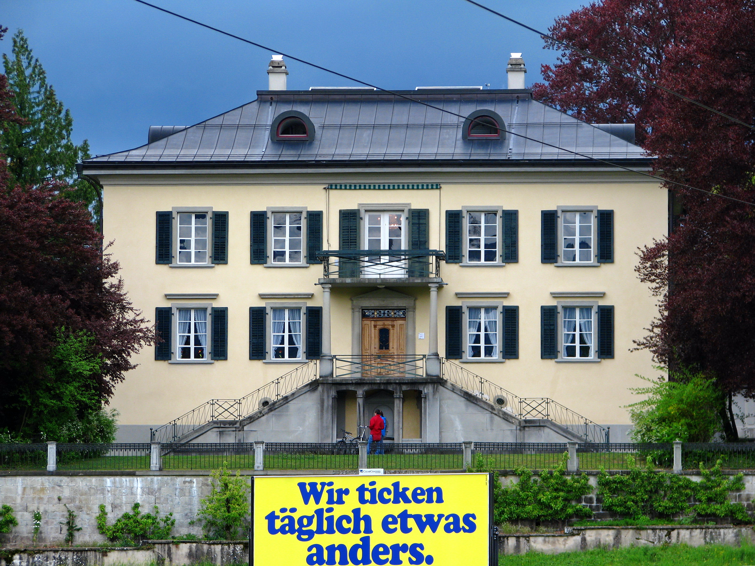 Villa Grünfels in Jona (SG)